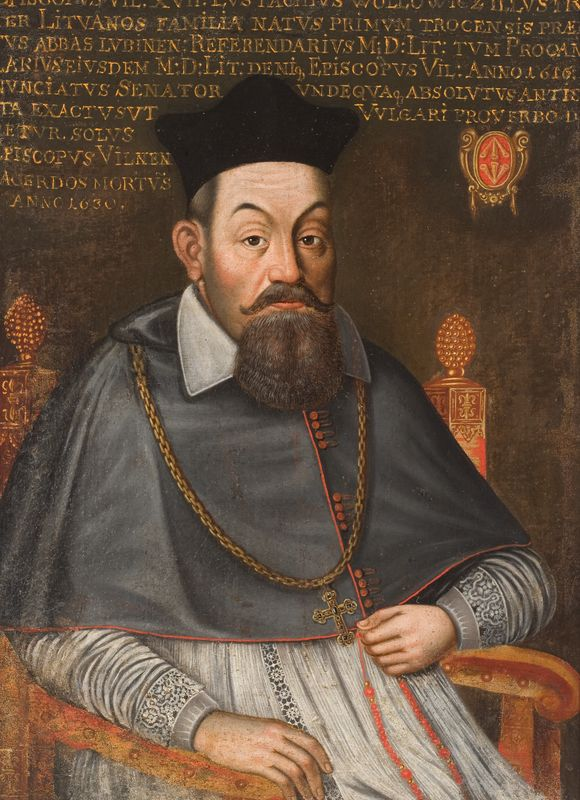 Беларуская (тарашкевіца): Партрэт Яўстаха Валовіча (Jaŭstach Vałovič)